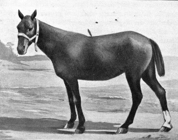 Basuto-Pony